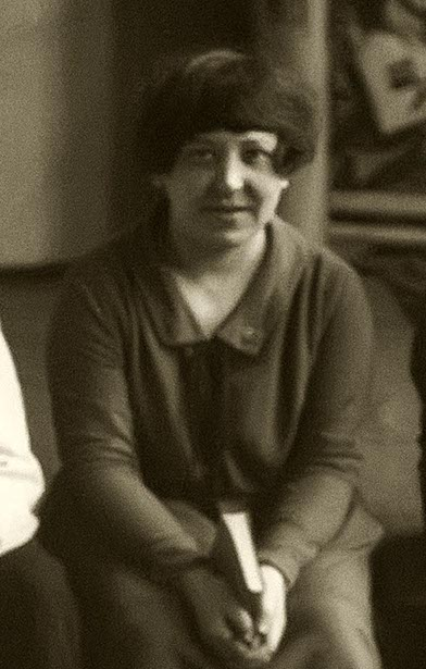 Режиссер Виталий Жемчужный Варвара Степанова и Александр Родченко во время подготовки представления